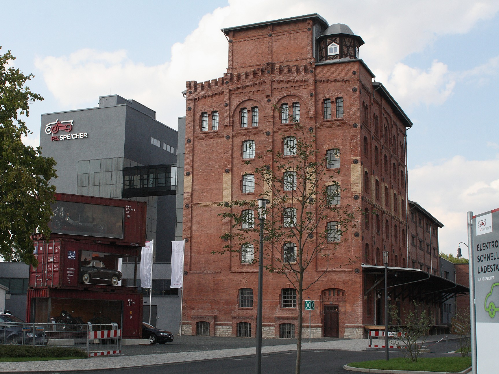 ehemaliges Kornhaus von 1898, saniert und seit 2014 Teil des Gebäudekomplexes/Museums PS-Speicher in Einbeck This is a photograph of an architectural monument. It is on the list of cultural monuments of Einbeck